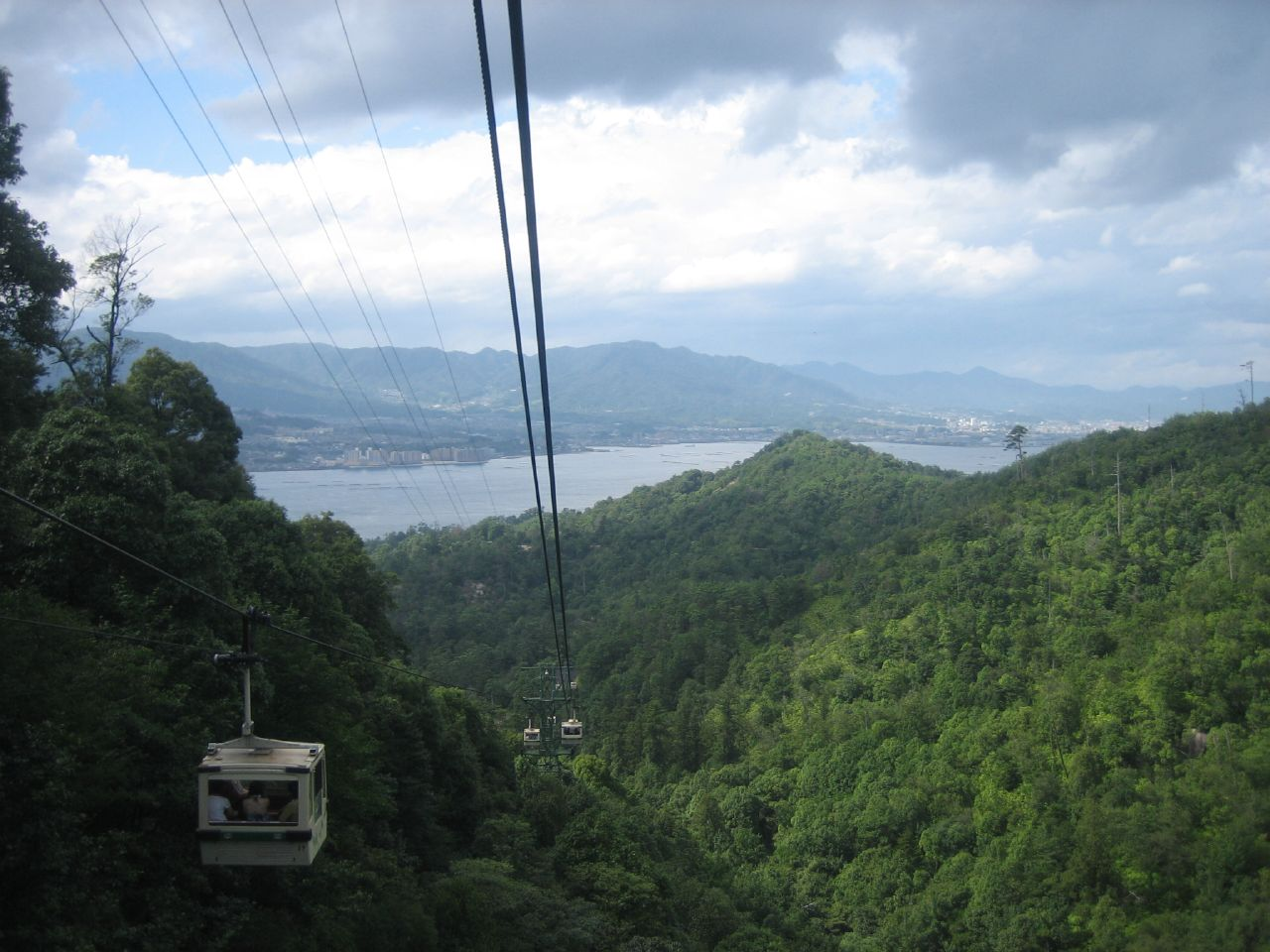 Miyajima Ropeway, Hiroshima.